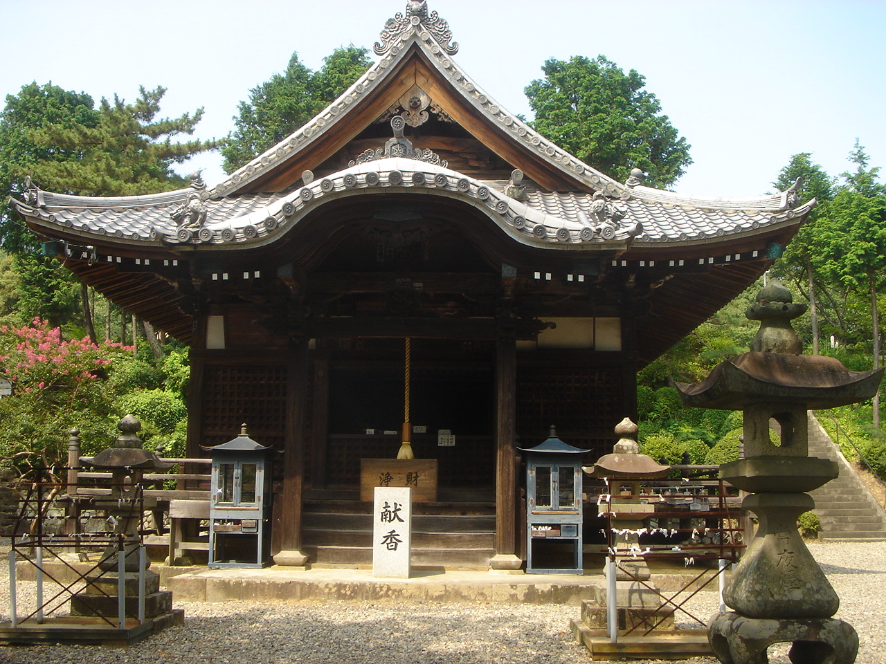 Gokokushiji(Temple)(護国之寺の本堂),Gifu,Gifu,Japan(岐阜県岐阜市)で撮影